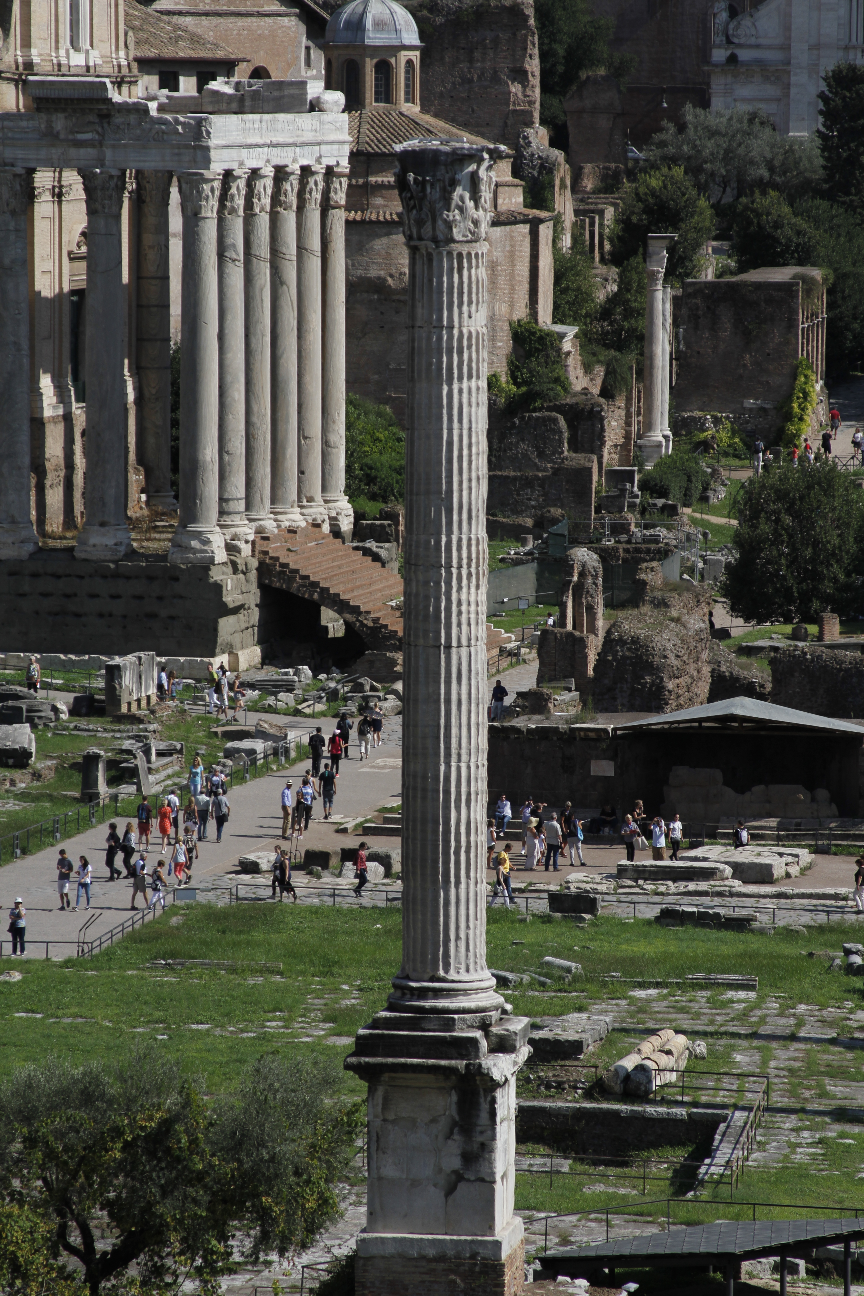 Roman Forum - Rome